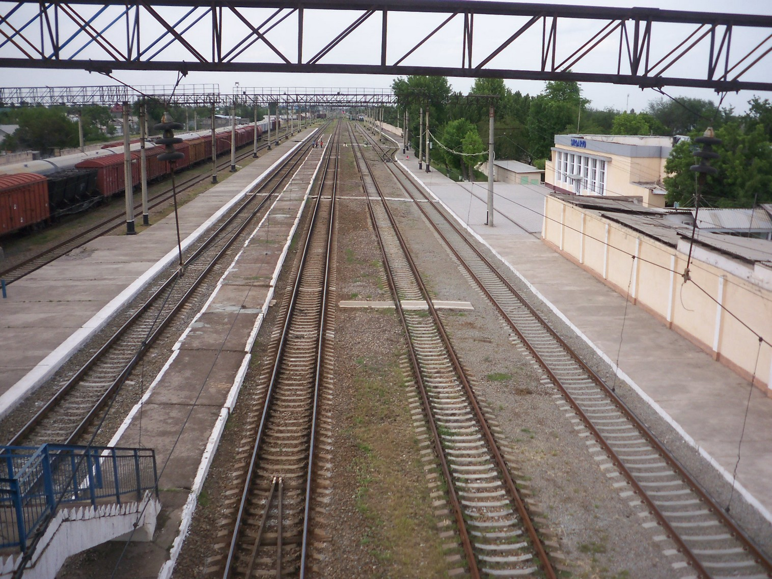 Железнодорожная станция Сырдарьинская